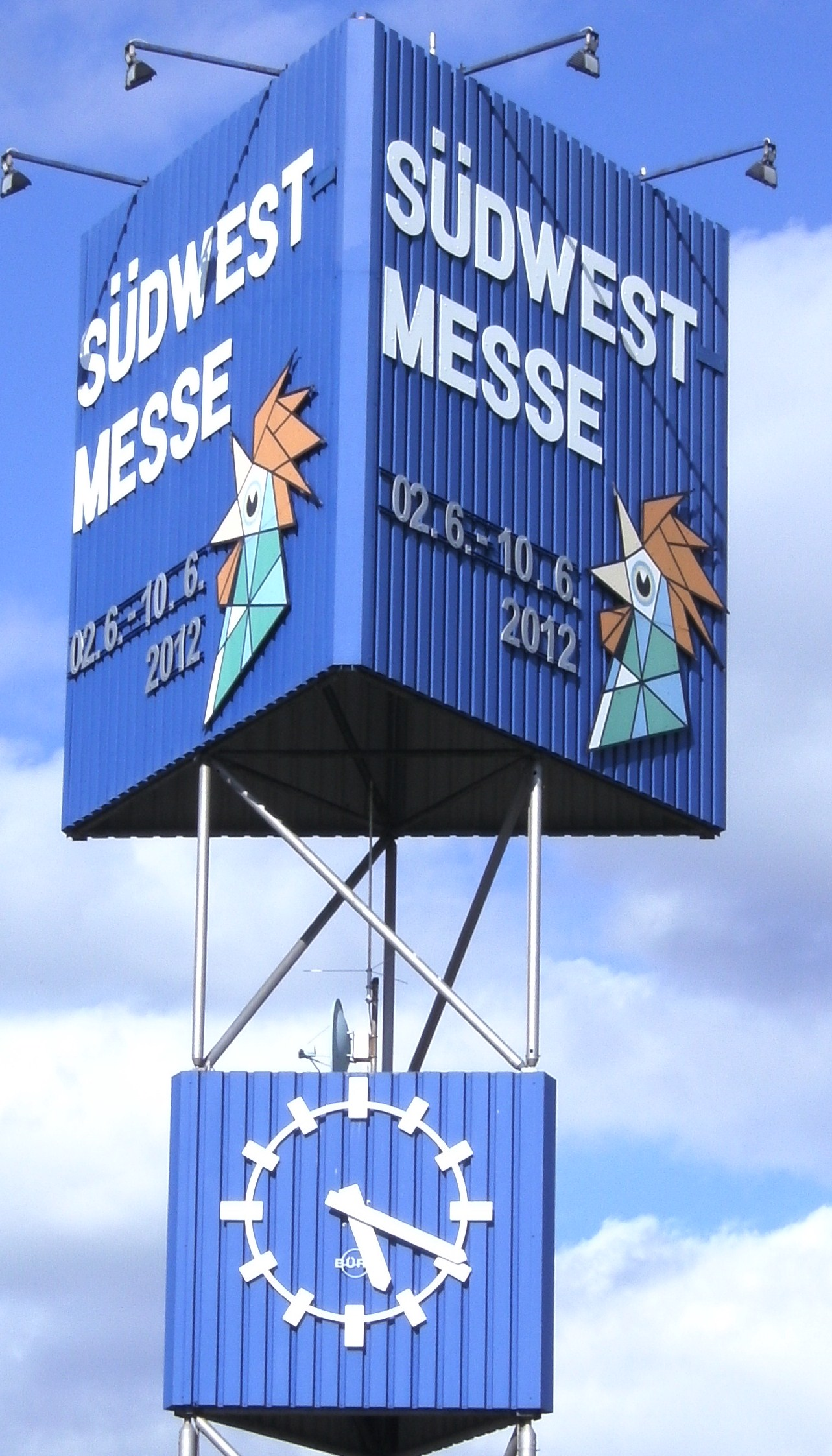 Messeturm und Logo der Südwest Messe, Villingen-Schwenningen, Deutschland